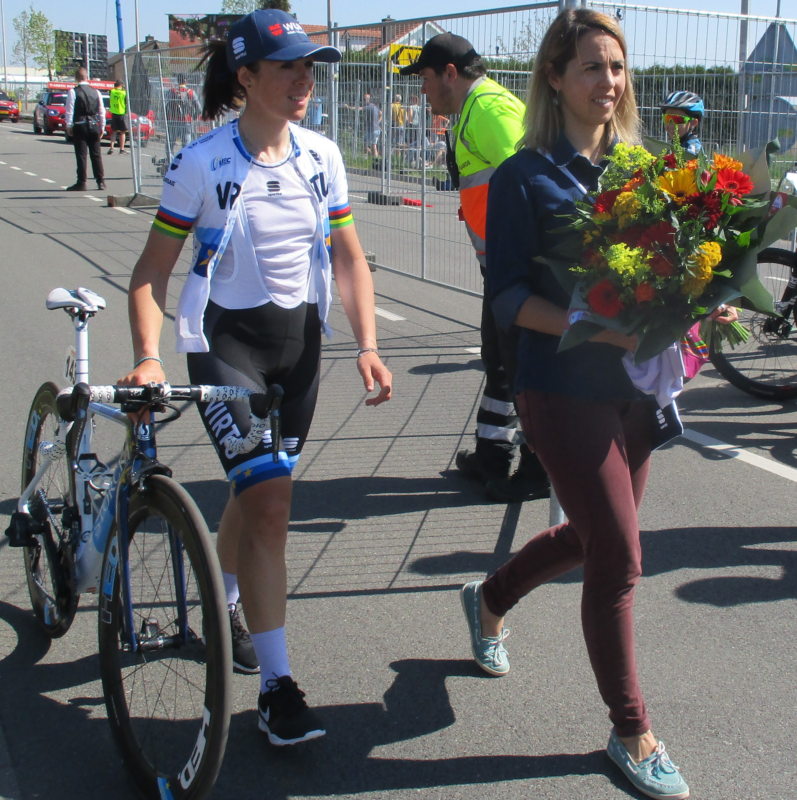 Finish van de Amstel Gold Race Ladies Edition 2019